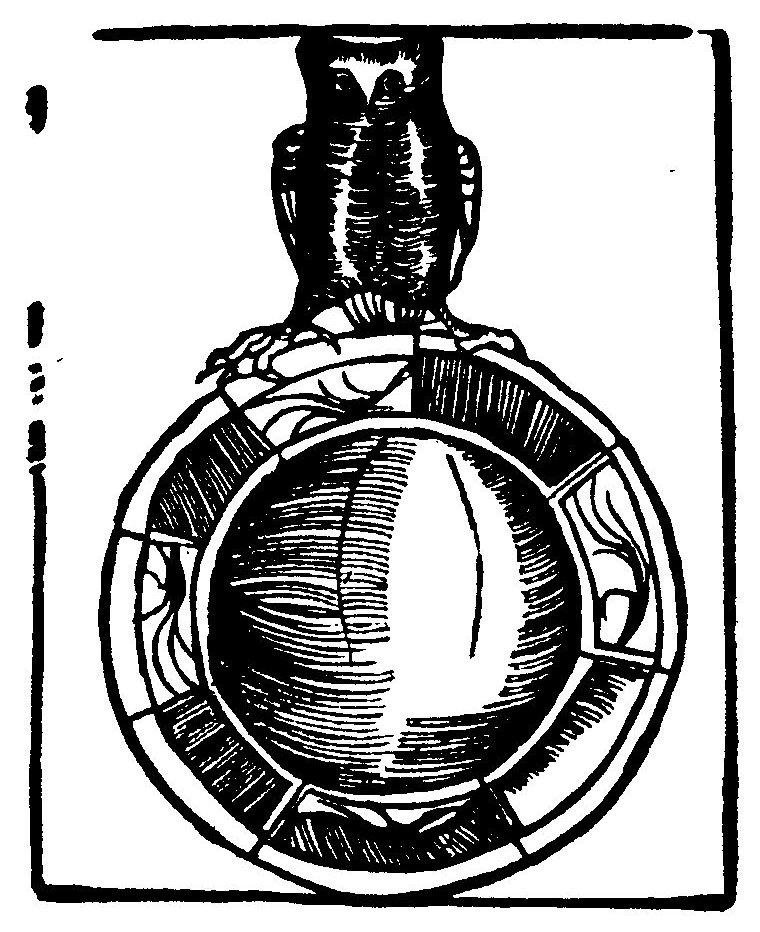 Ein kurtzweilig lesen von Dyl Vlenspiegel gebore vß dem land zu Brunßwick : wie er sein Leben vollbracht hatt ; XCVI seiner Geschichten